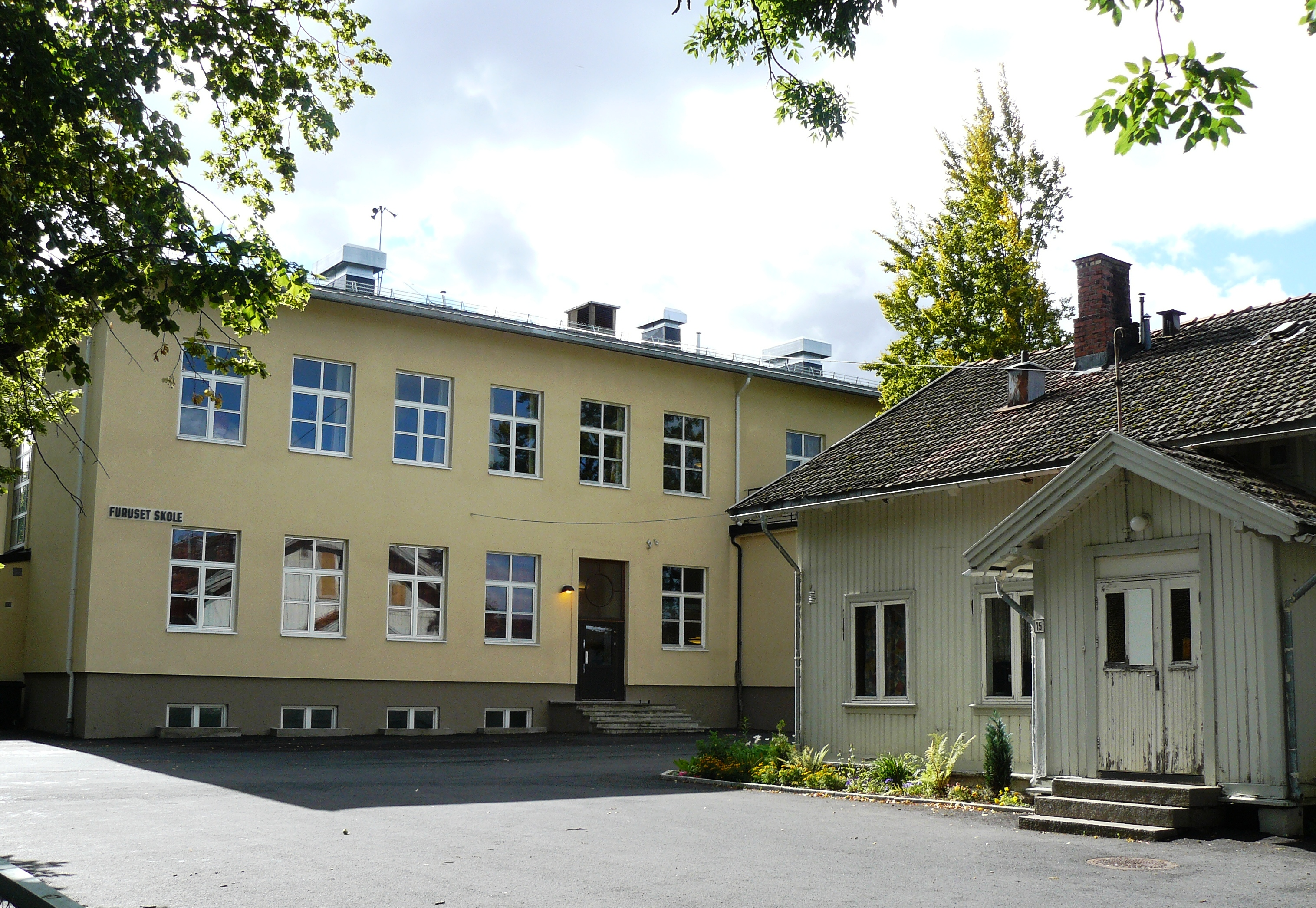 Furuset school, Oslo